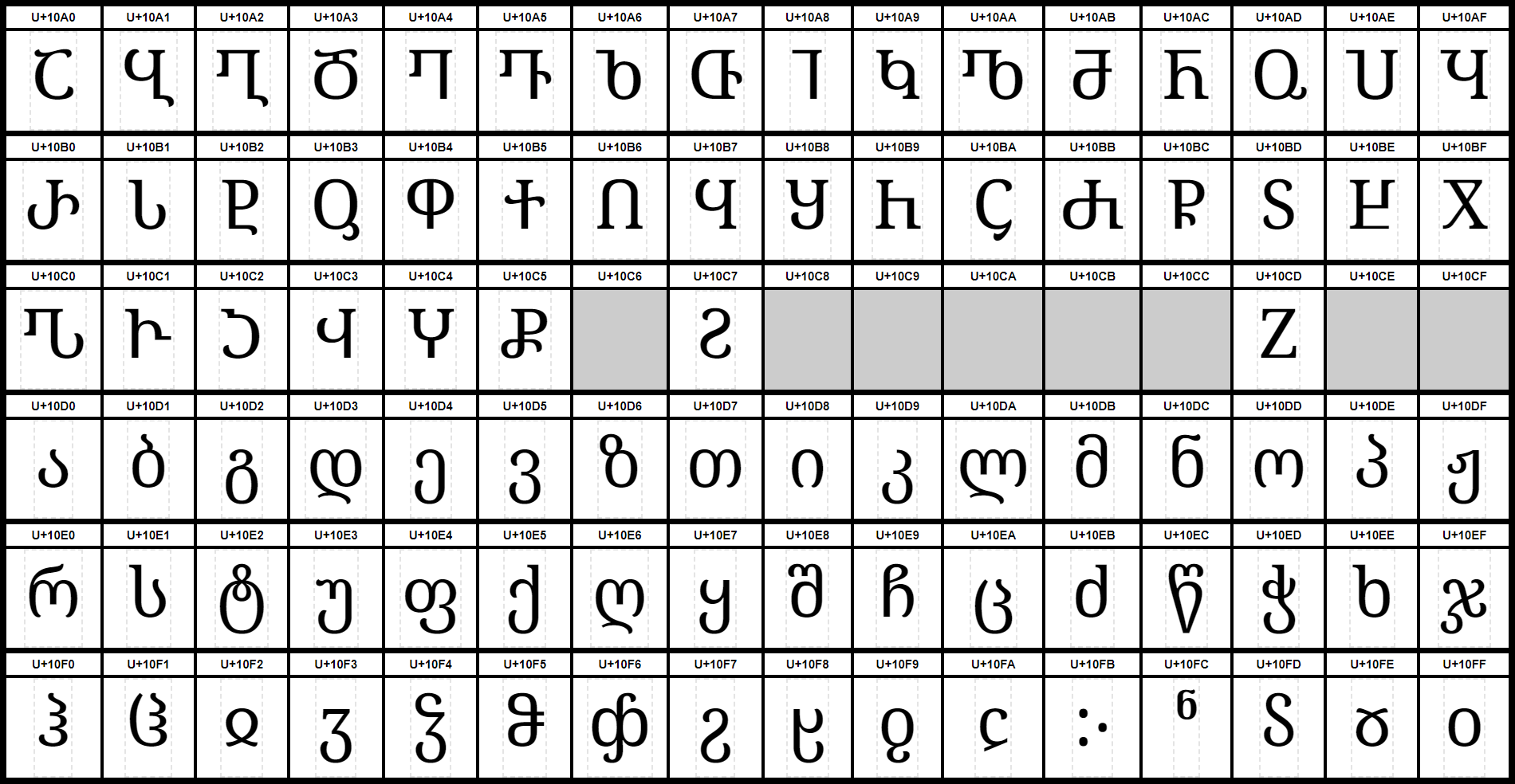 Grafiktafel für den Unicodeblock Georgisch. Schraffierte Felder sind unbesetzte Codepoints.